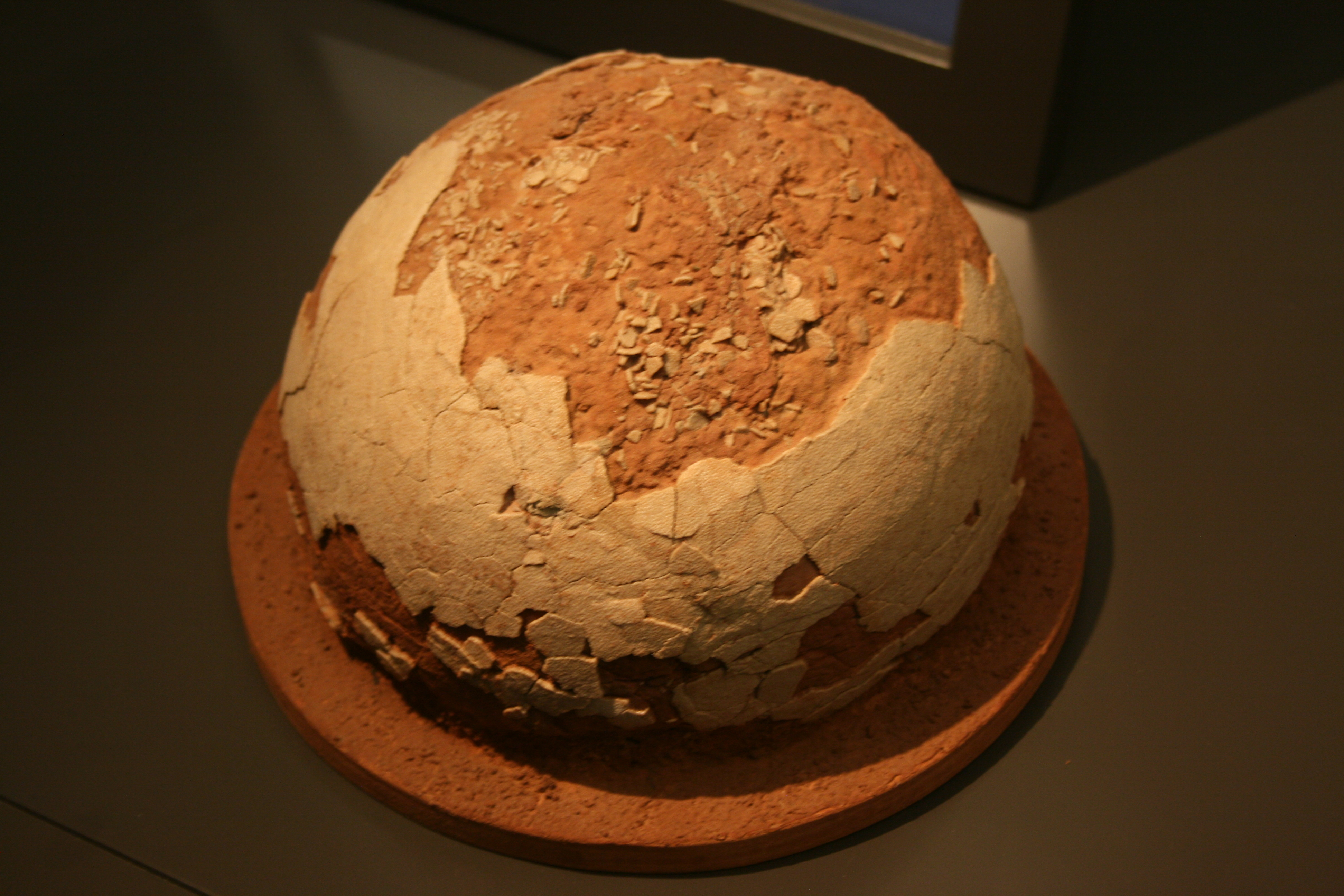 Ei des Titanosaurus in Wien.